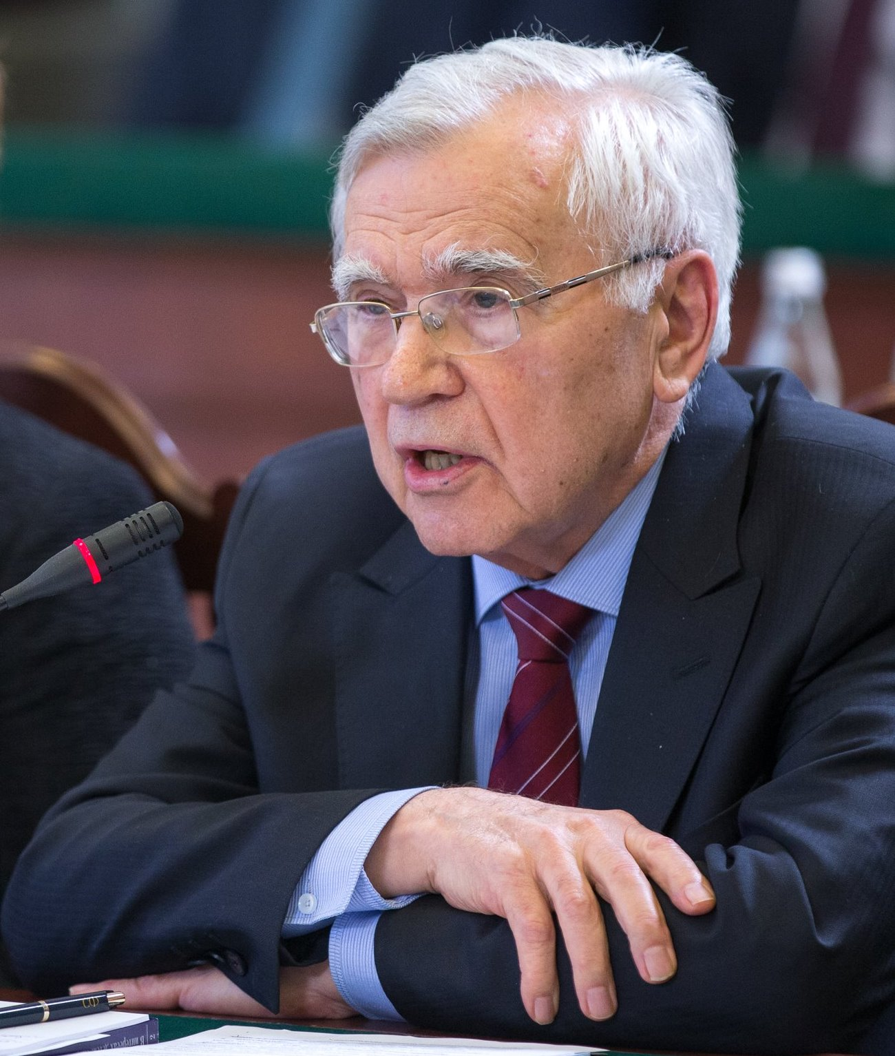 Борис Николаевич Пастухов (род. 1933) — советский, российский политический деятель